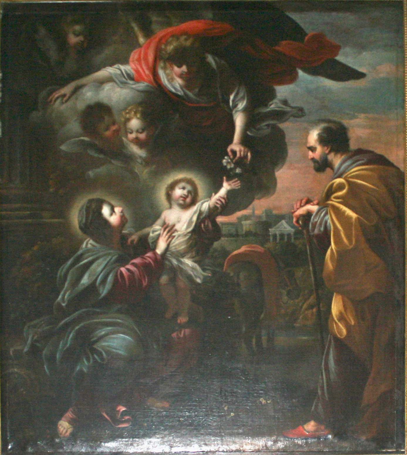 Tableau de Michel Serre représentant le repos pendant la fuite en Egypte se trouvant dans l'église des Augustins à Marseille.